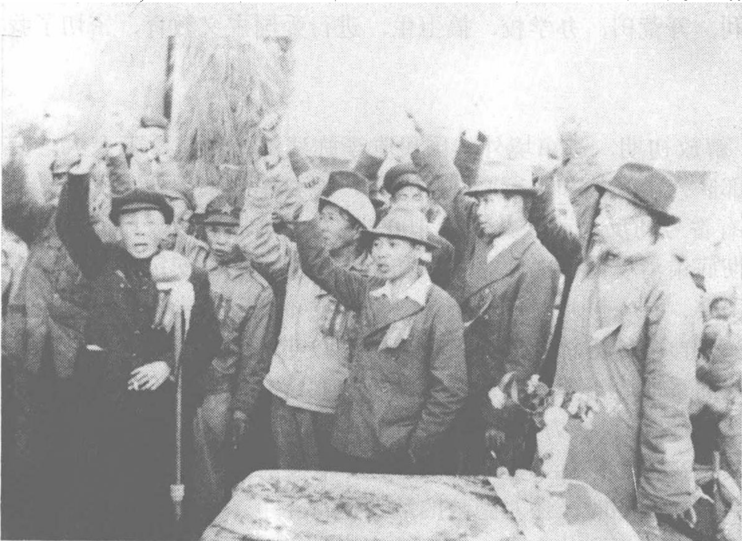 中文（中国大陆）: 1950年中央民族访问团在芒市访问